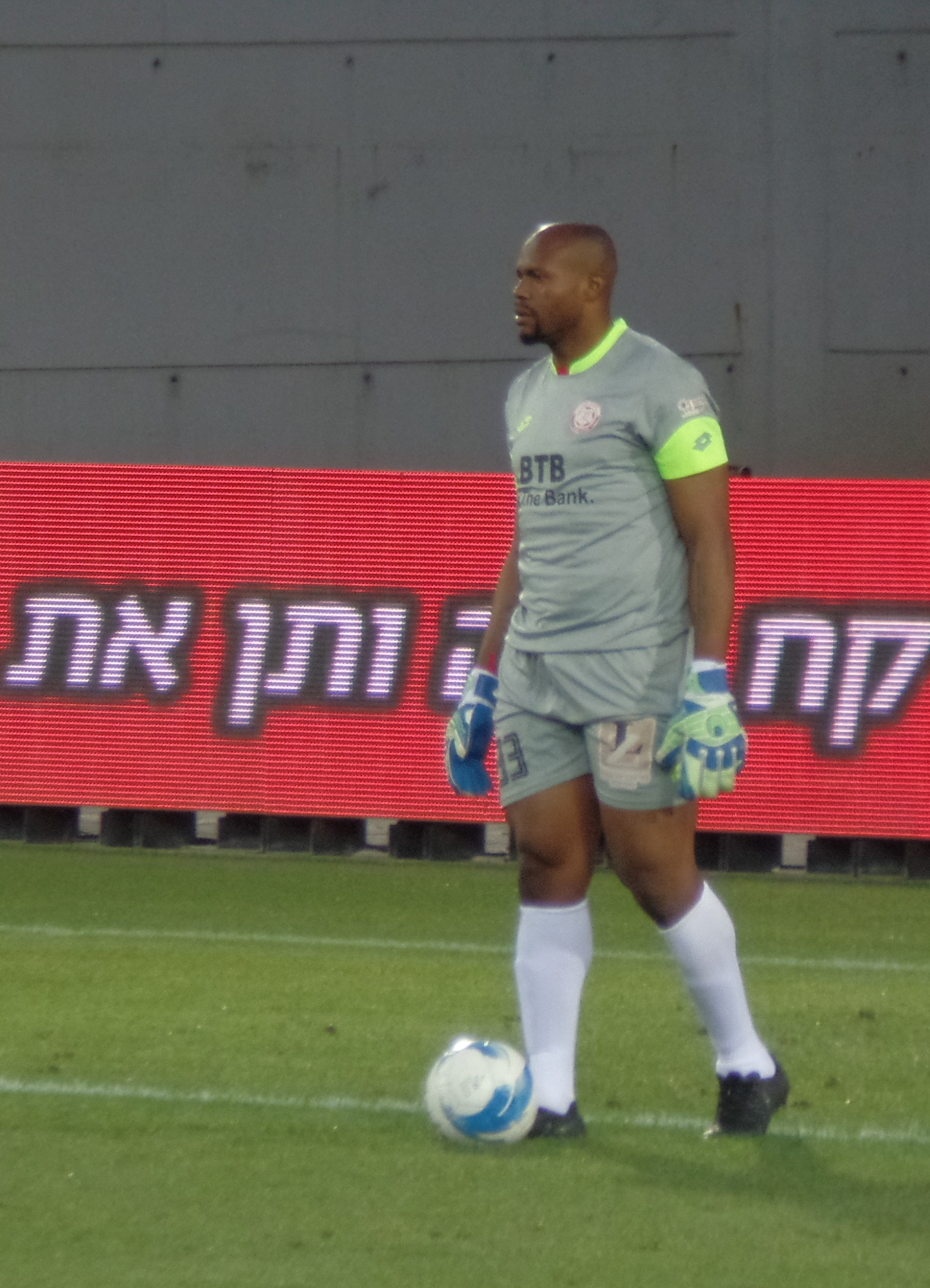 2019 Austin Ejide Hapoel Hadera אוסטין אג'ידה במדי הפועל חדרה